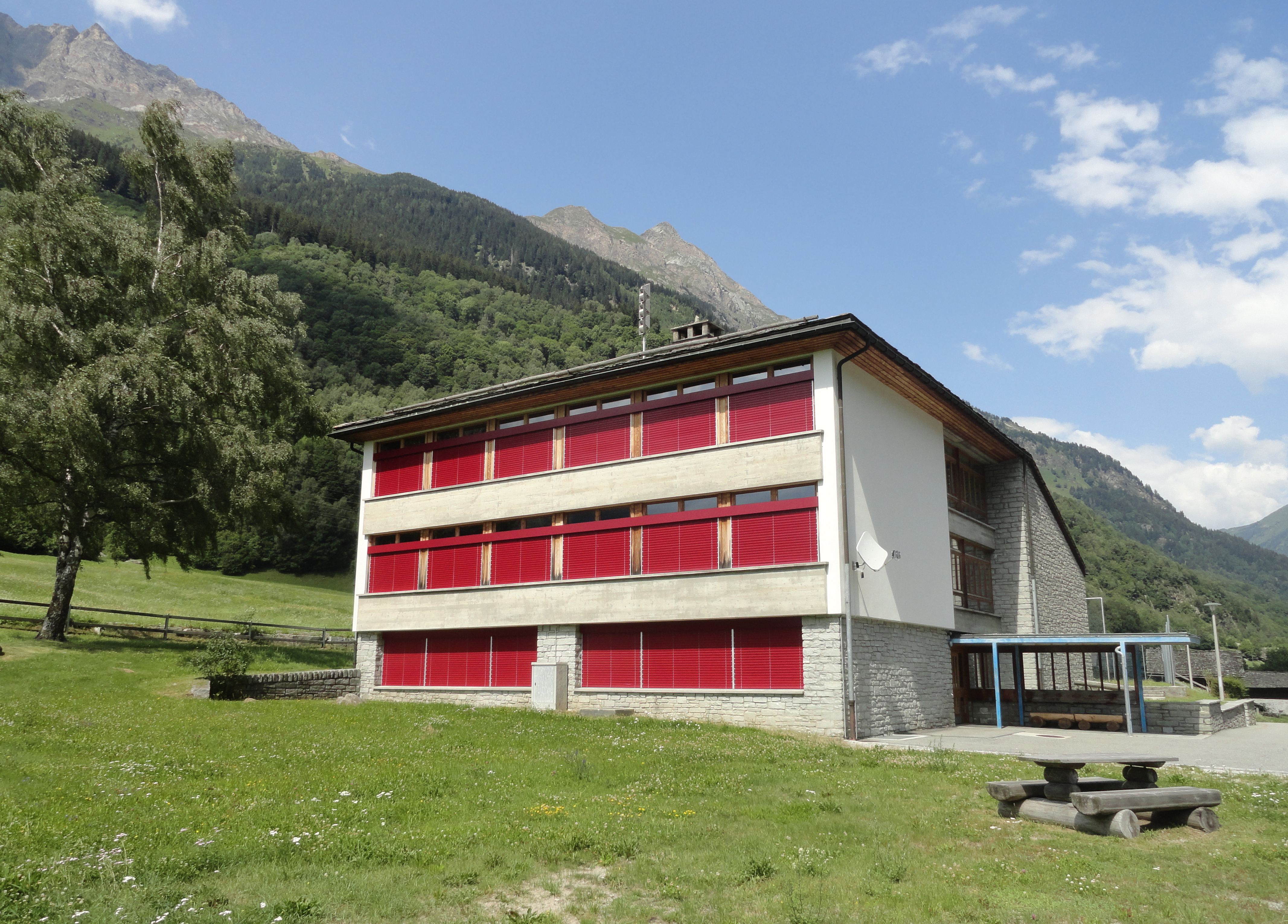 Stampa: Schulhaus, entworfen von Bruno Giacometti